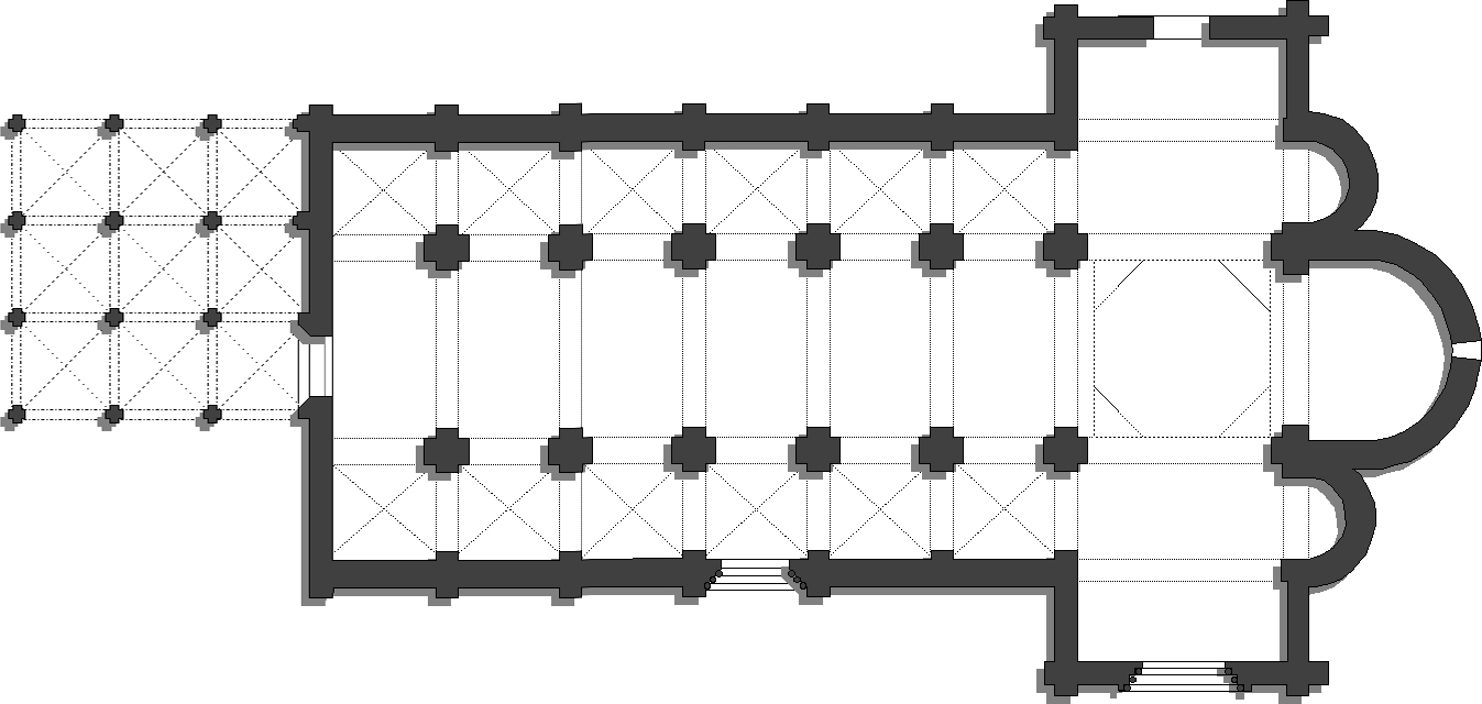 Planta de la colegiata real de San Isidoro de León (España). Actualmente ha perdido la cabecera, sustituida por una gótica. A los pies de la iglesia puede verse el pórtico que sirvió de Panteón de los Reyes del reino de León. La iglesia es del siglo XII, atribuida al maestro Petrus Deustamben y el Panteón de los Reyes es del siglo XI, construido por iniciativa de los reyes Don Fernando y Doña Sancha